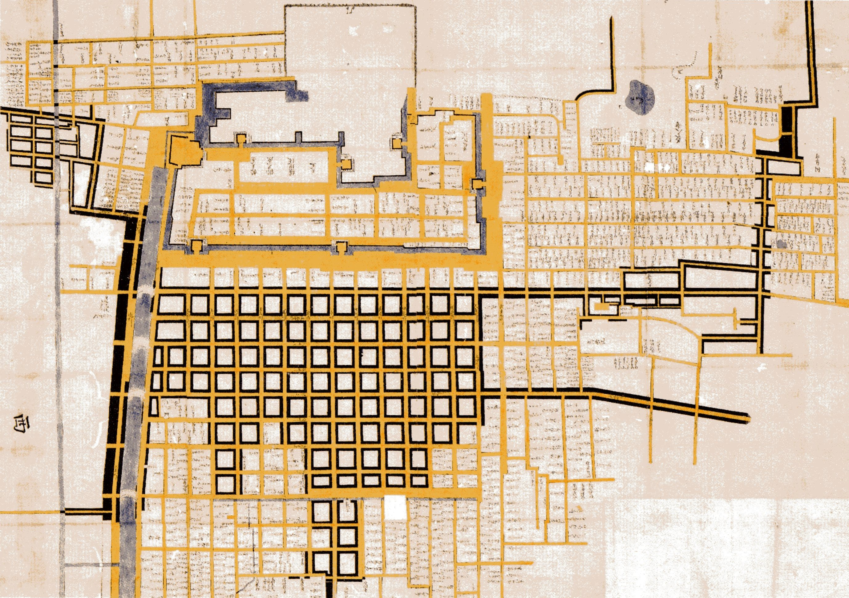 万治年間名古屋絵図